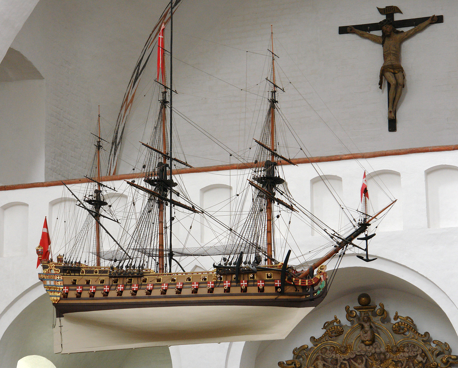 Dom zu Århus: Votivschiff Unity von 1720, gebaut in Holland als Modell (statt Zeichnung) für Kriegsschiffe an Zar Peter den Großen. Es ist das größte Votivschiff einer dänischen Kirche. Länge: 2.56, Höhe: 3.50 m